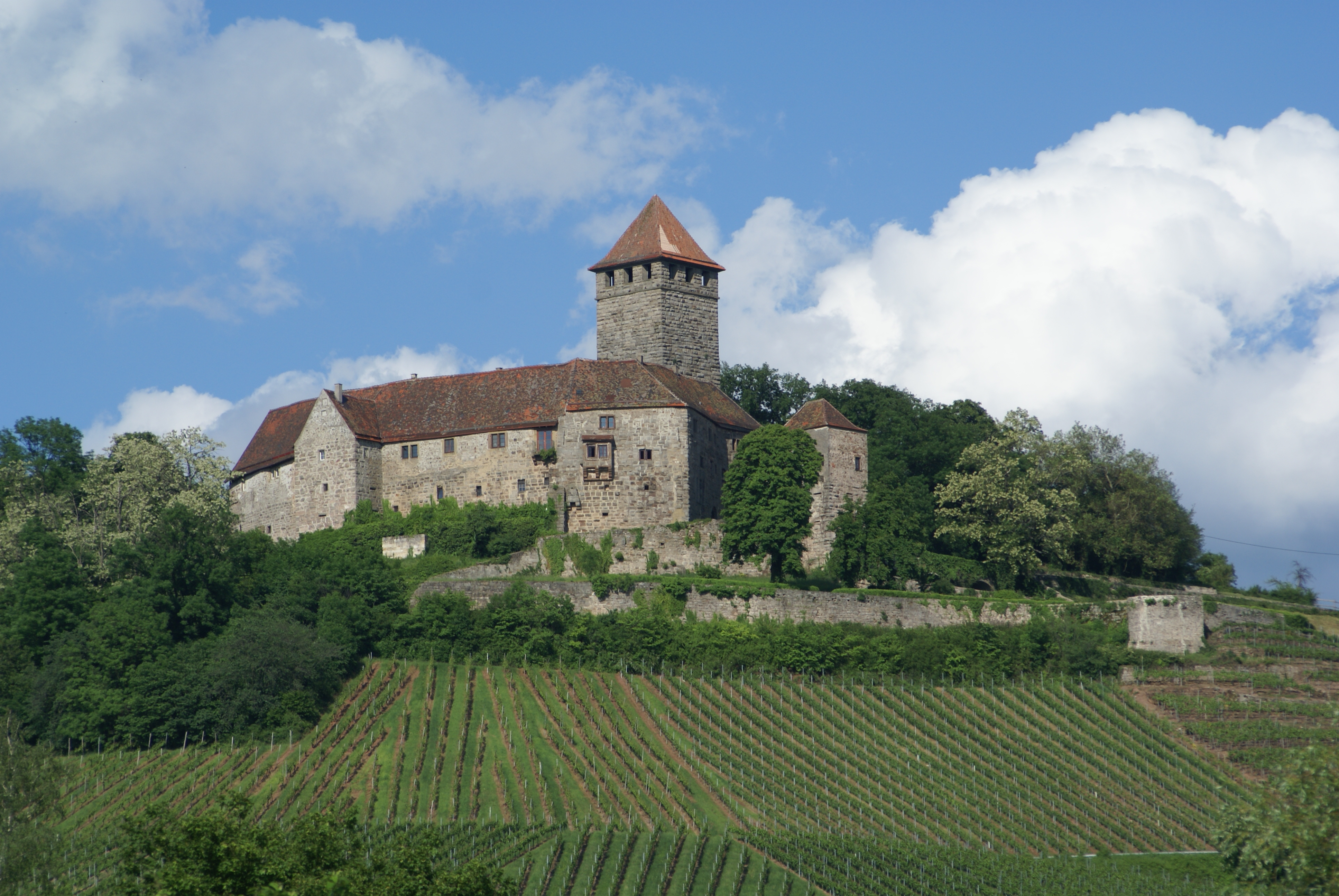 Burg Lichtenberg in Oberstenfeld aus Sicht von Lembach.